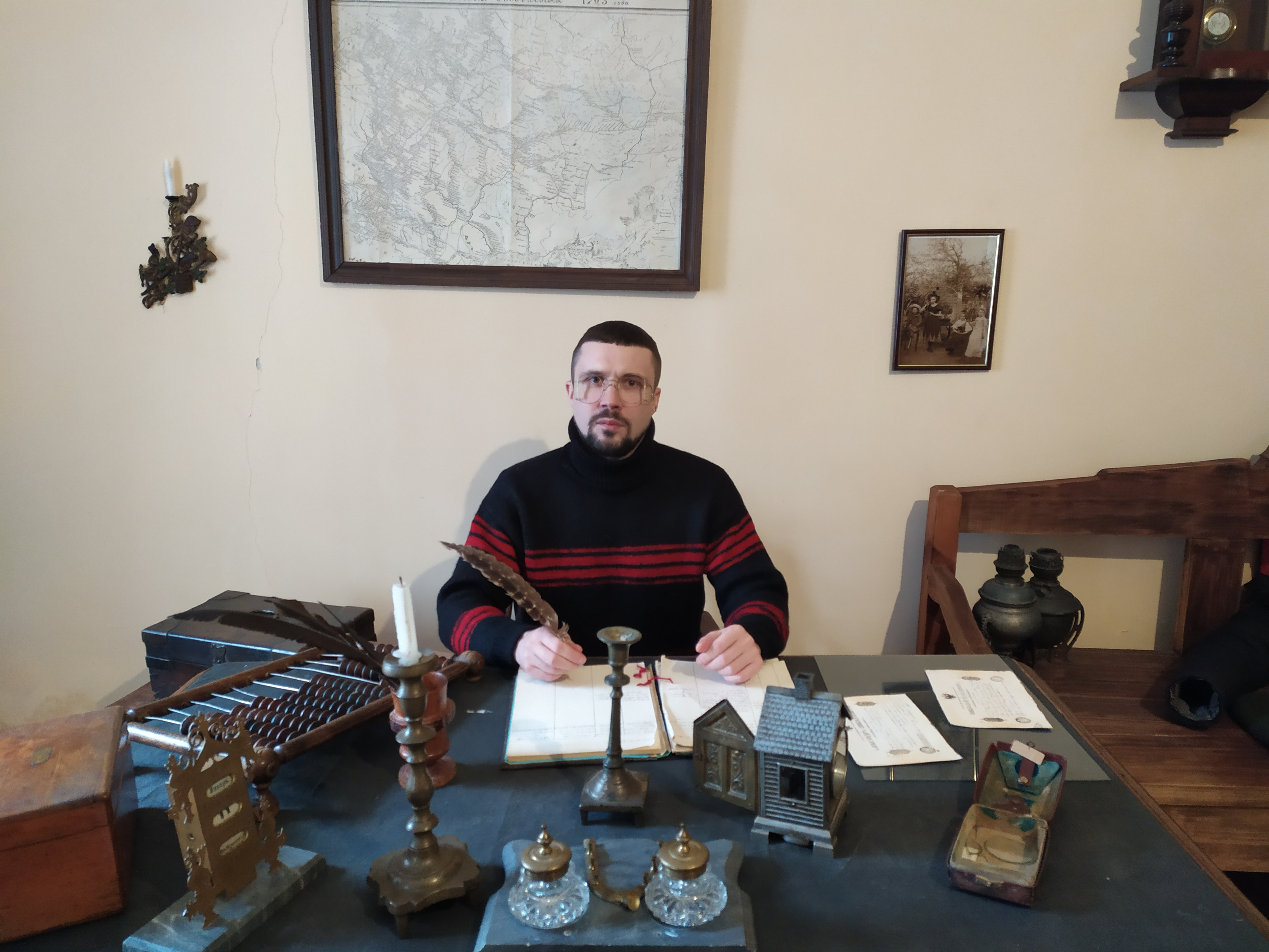 Ігор Криворучко